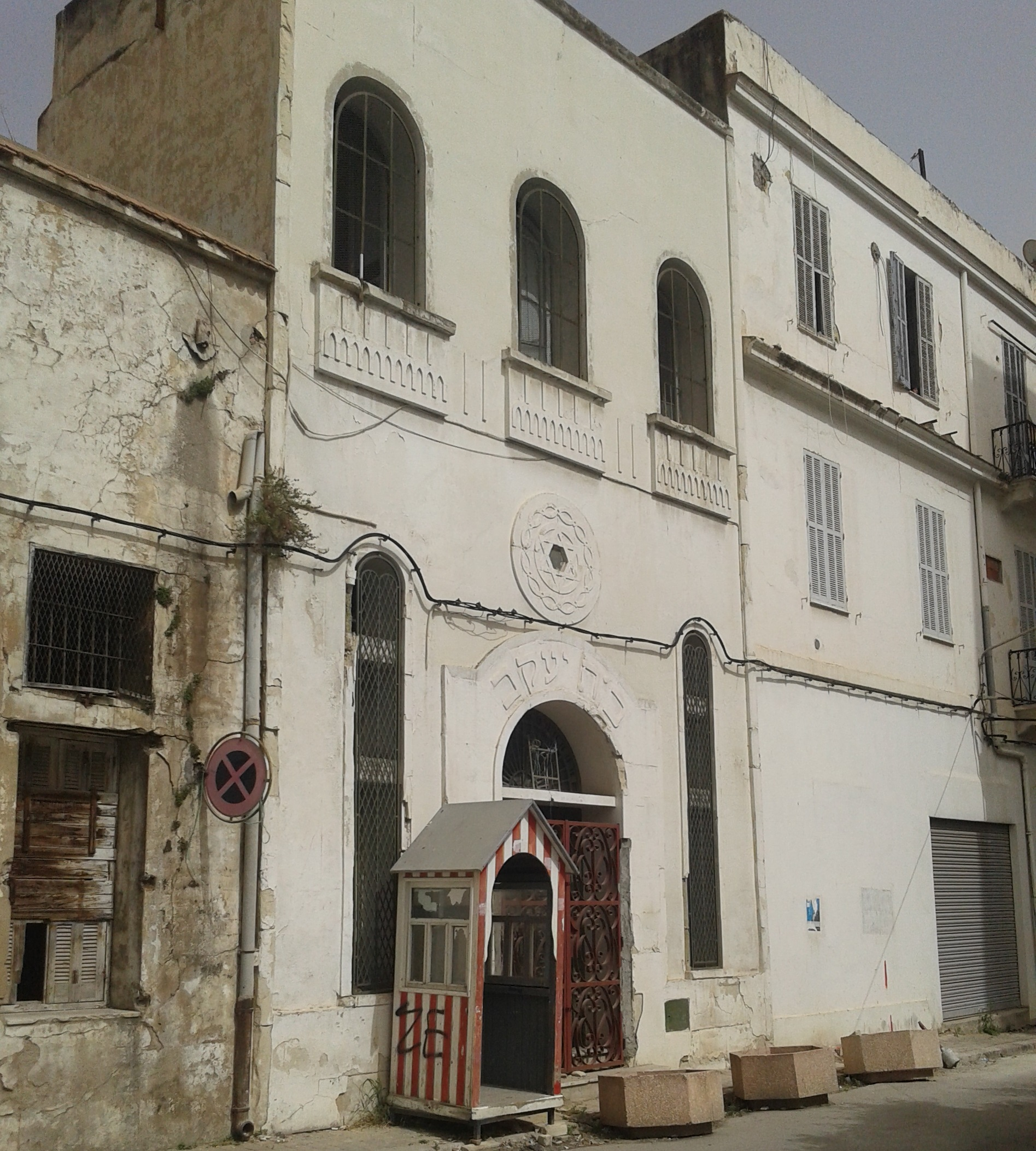 Synagogue Bet Yaakov à Tunis